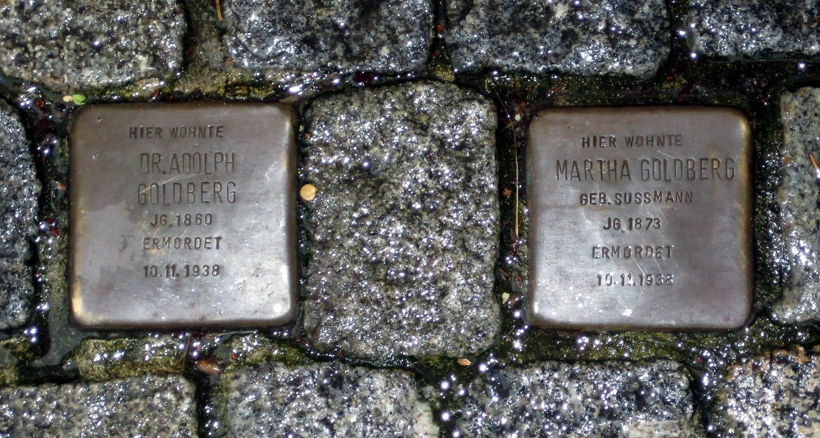 Stolpersteine zum Gedenken an das Ehepaar Dr. Adolph Goldberg und Martha Goldberg in Bremen-Burgdamm, Bremerhavener Heerstraße 18